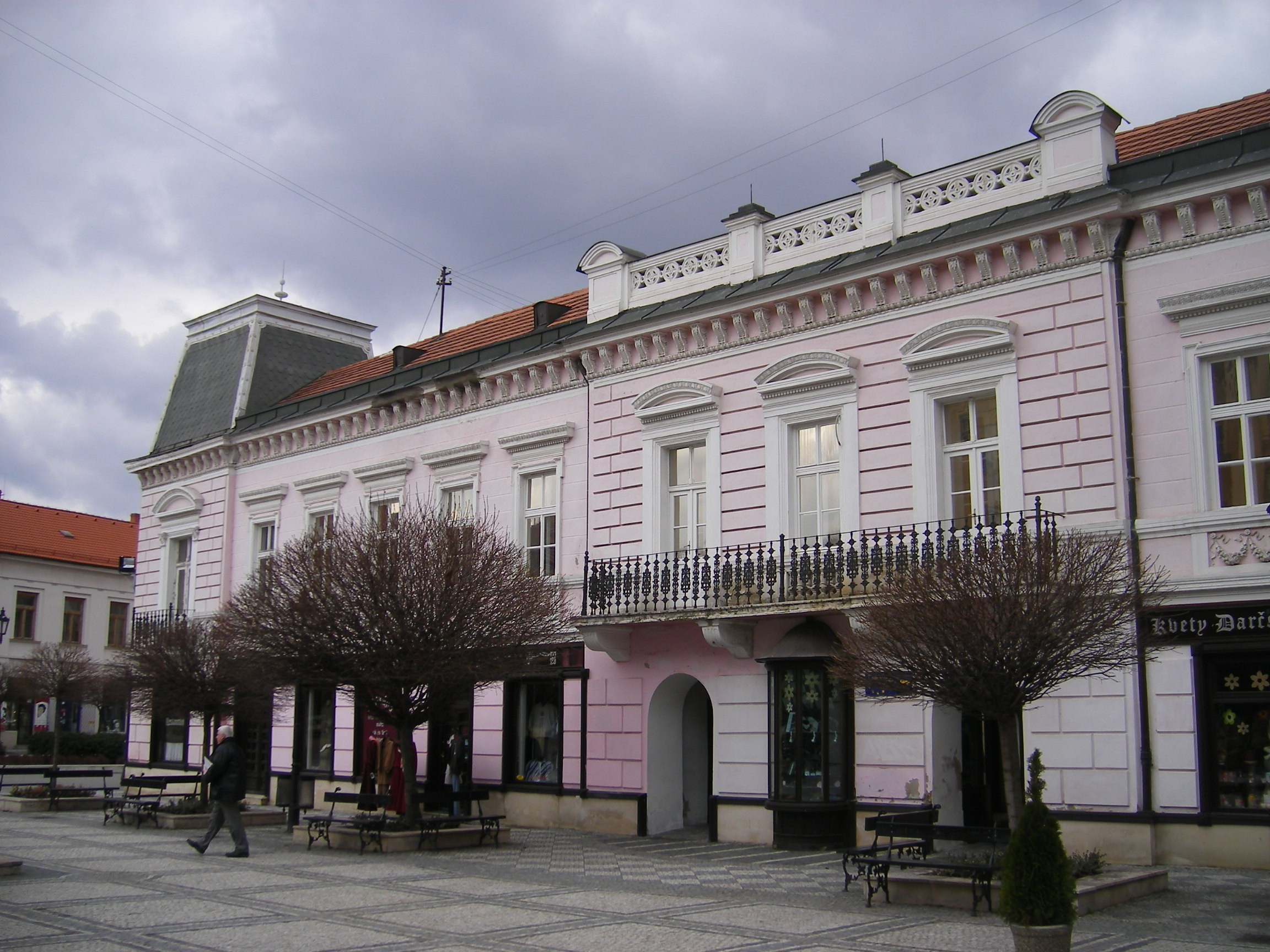 Komárom - a Zichy-palota Klapka-tér felé eső oldala